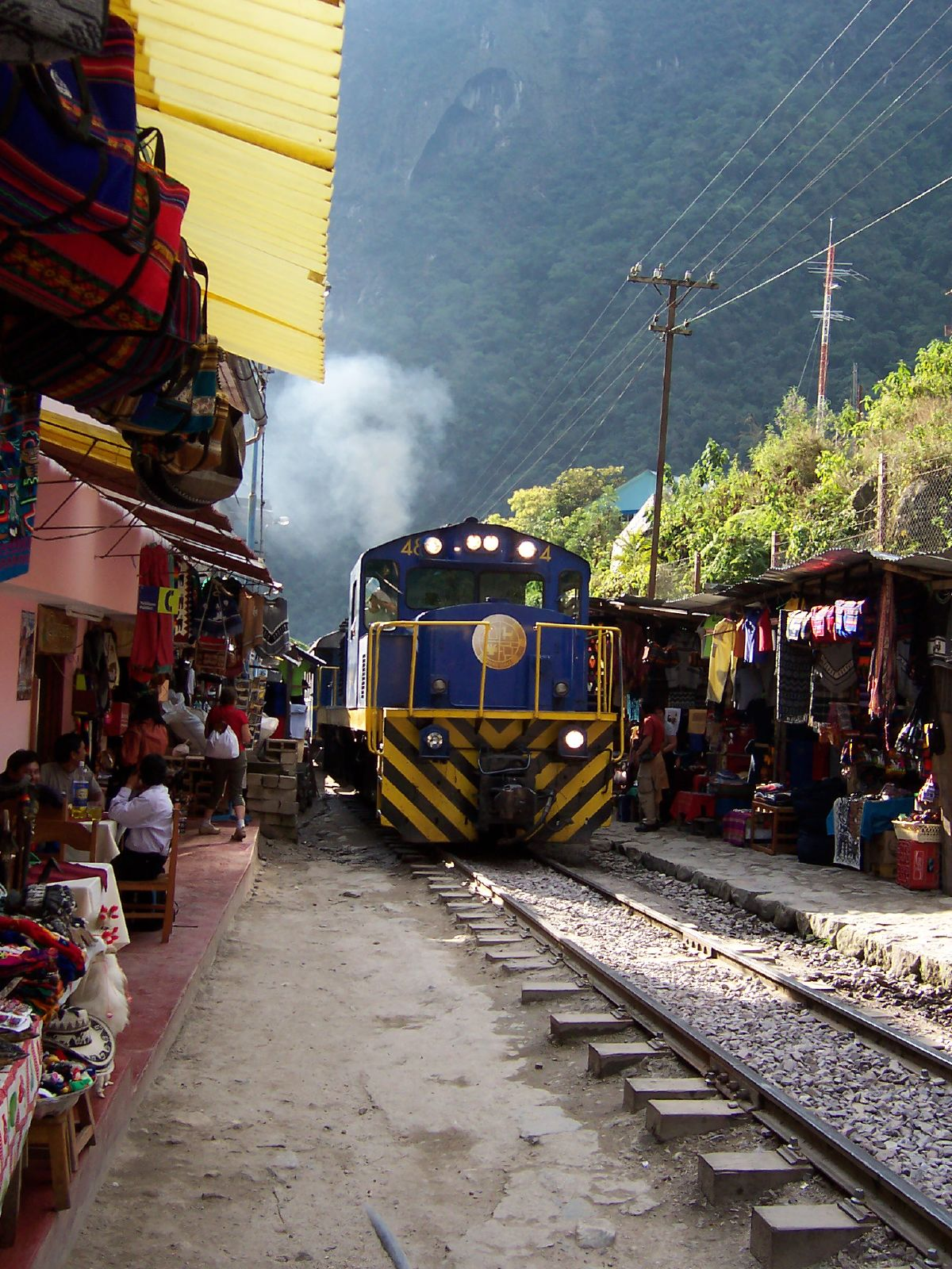 PeruRail diesel locomotive 484.000_0232